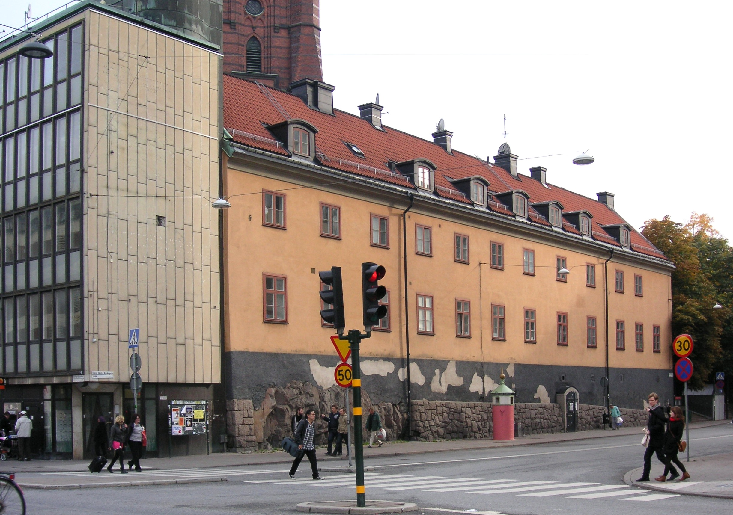 Klara skola, Stockholm